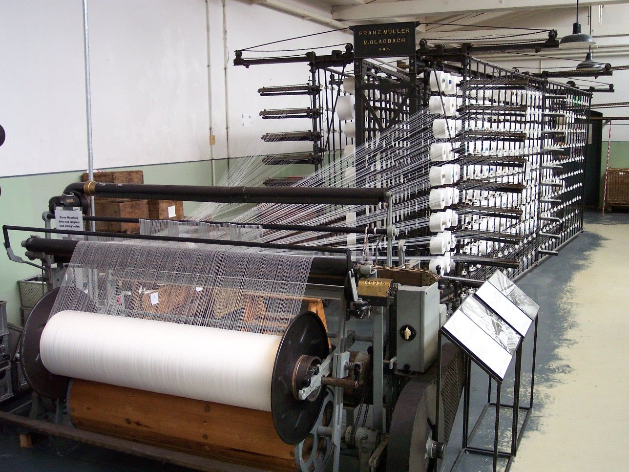 Zettelmaschine